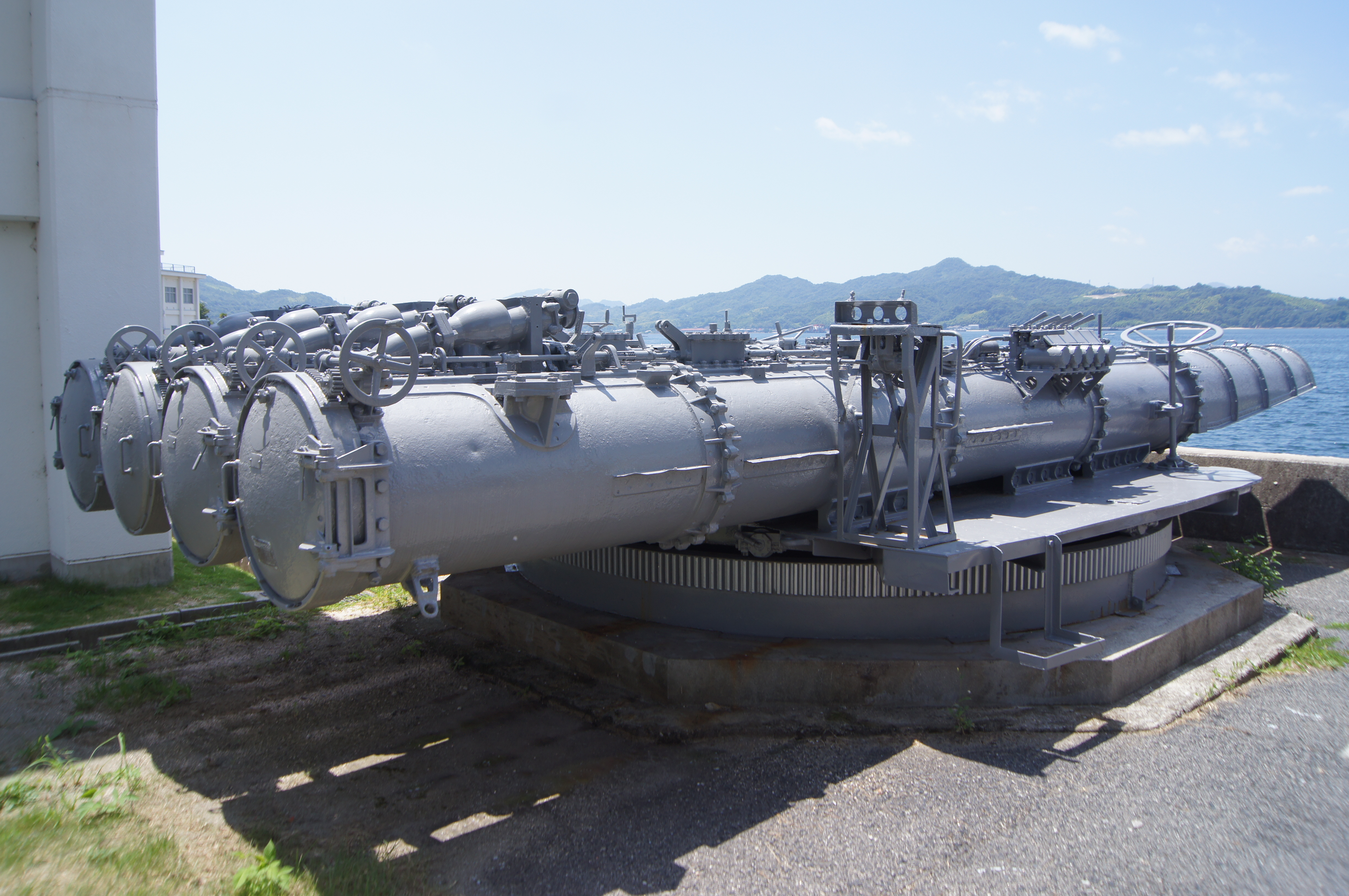 駆逐艦梨に搭載されていた92式ja:魚雷発射管。海軍兵学校 (日本)似て撮影。